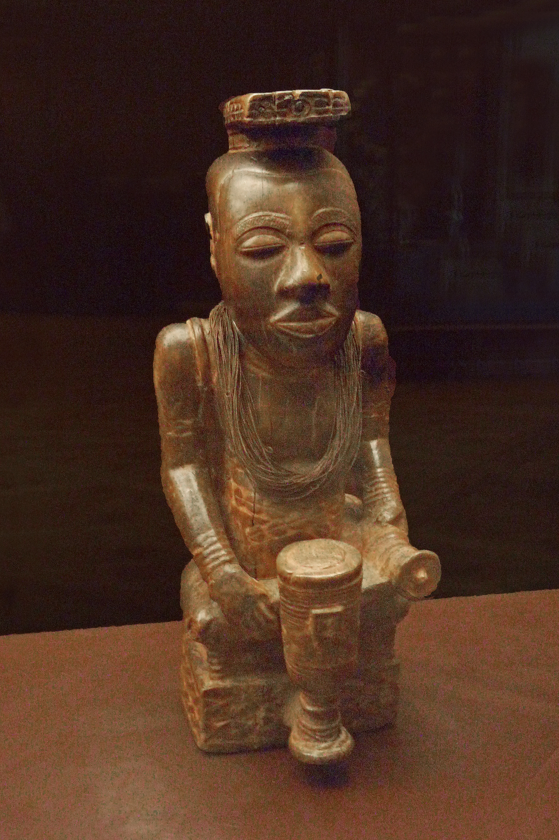 Bushong (Kuba) : statue royale ndep (Kasaï-Occidental, RDC), au Musée royal de l'Afrique centrale